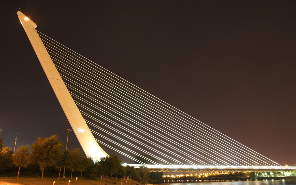 Dice la canción que "Sevilla tiene un color especial". En realidad es una errata, debería decir que "Sevilla tiene un calor especial". Tras 4 días metido en el Centro de Alto Rendimiento de la Cartuja, me he traído un cuerpo pegajoso por el continuo sudor y un par de fotos nocturnas del puente del Alamillo. Por cierto, un taxista lo llamaba "el monumento a la salud", xDD.